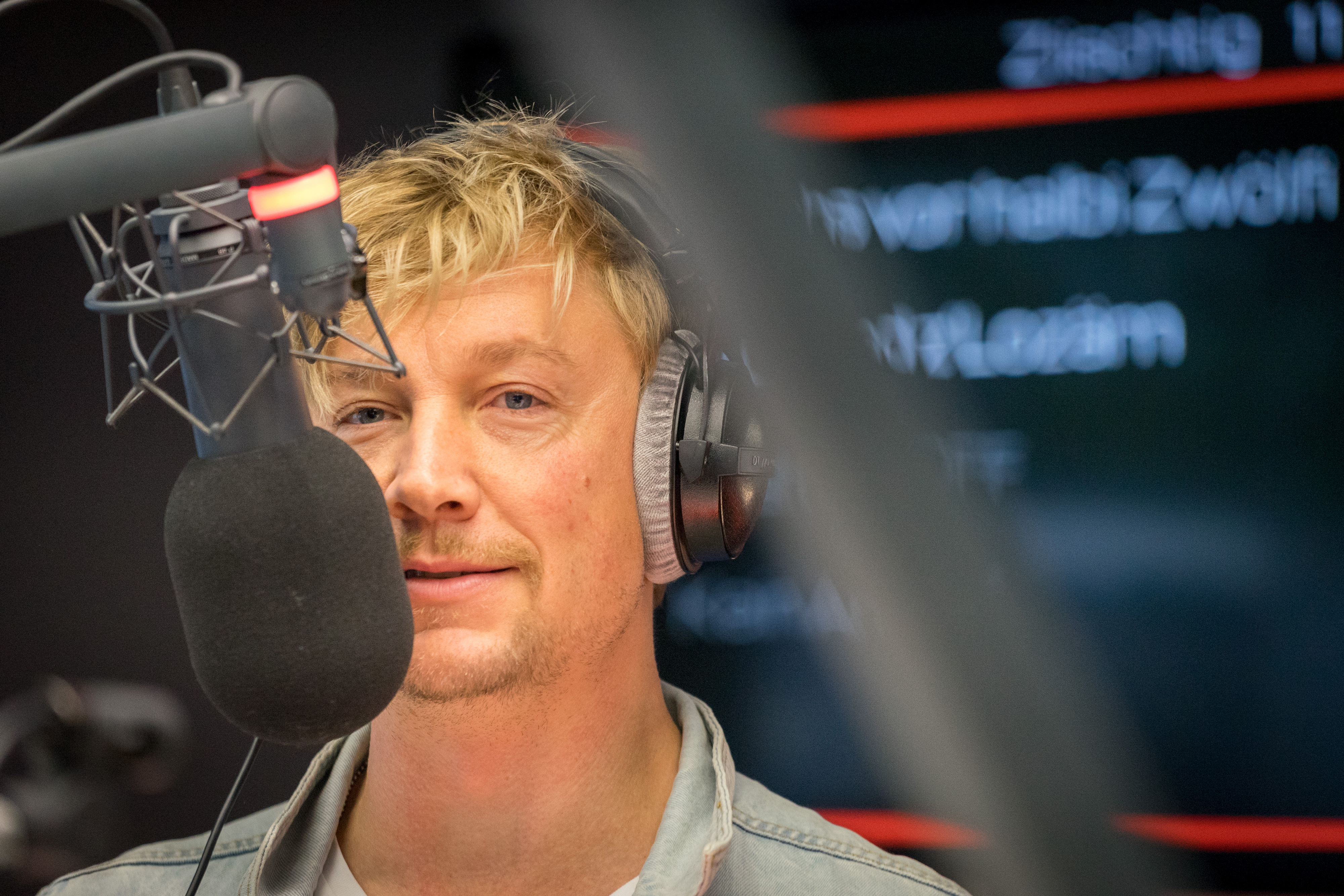 Samu Haber von Sunrise Avenue bei Radio Pilatus